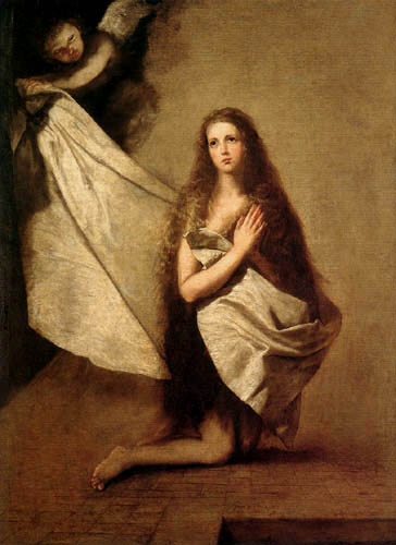 Die Heilige Agnes im Gefängnis